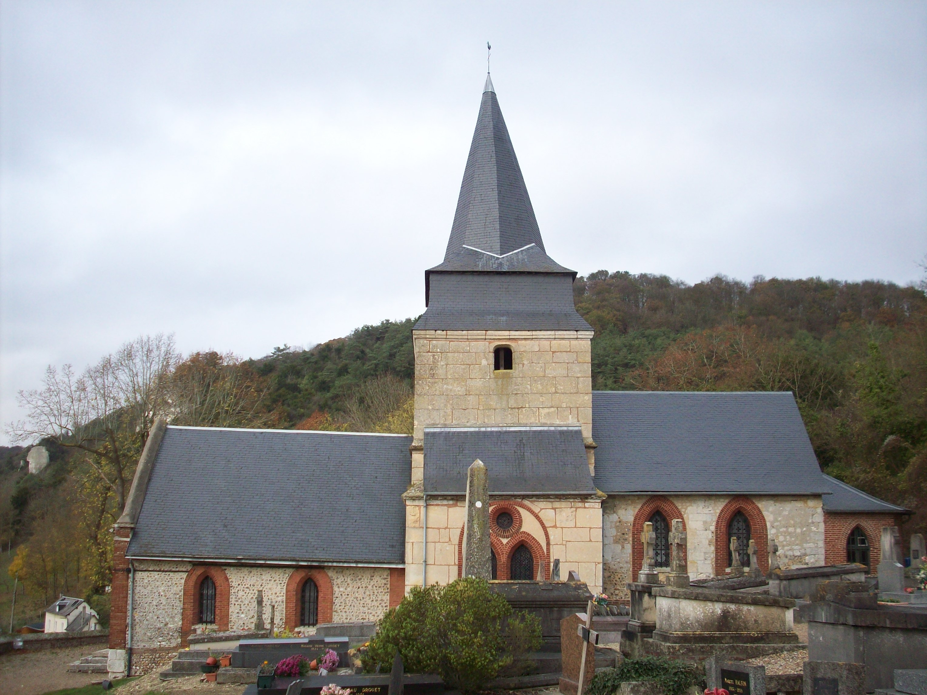 Eglise Saint-Michel d'Amfreville-sous-les-Monts